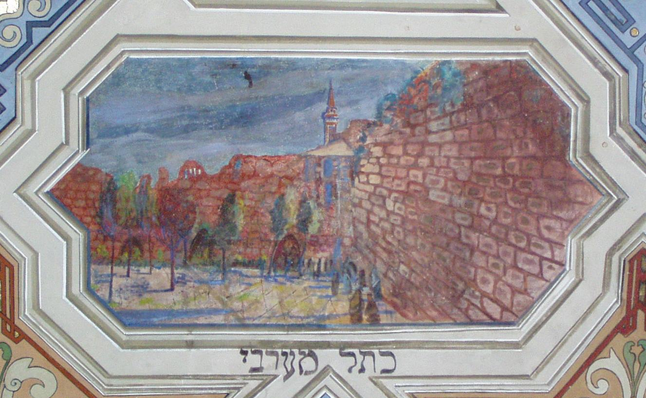 Sceny biblijne na stropie synagogi Kupa w Krakowie